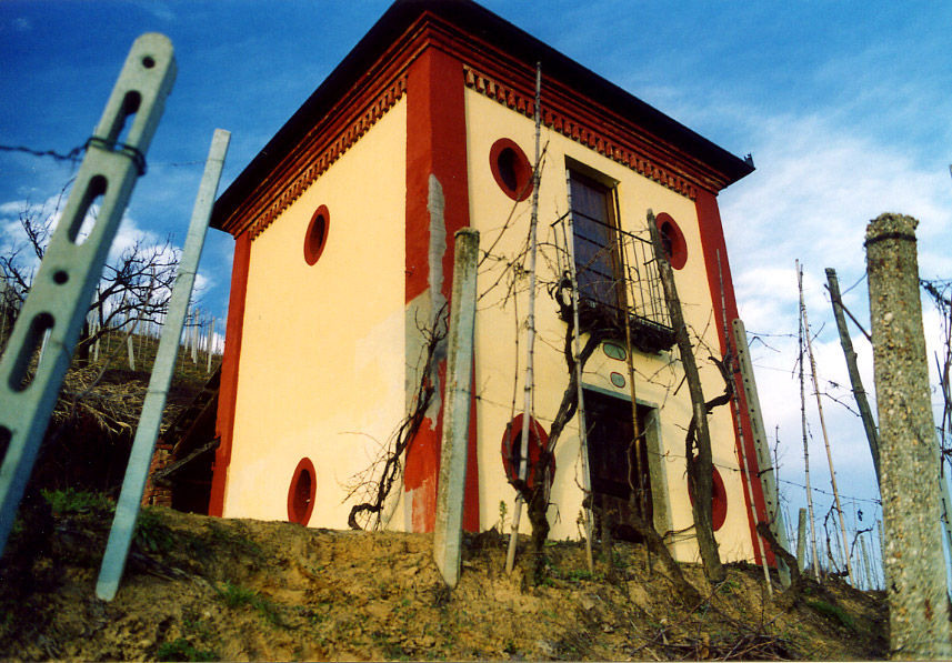 Ciabòt Roero